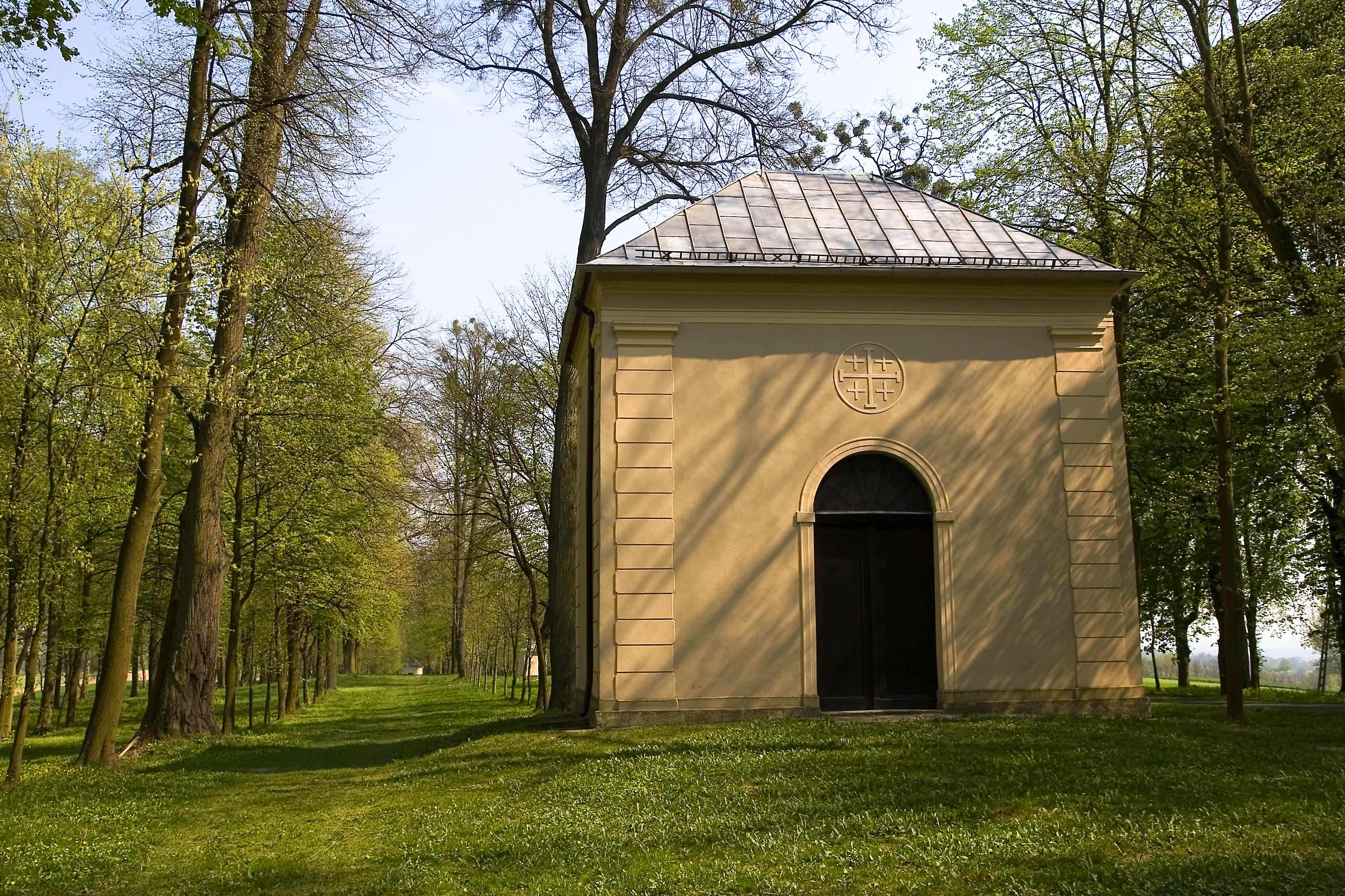 Góra św. Anny, kaplica Brama Zachodnia. Gmina Leśnica, powiat strzelecki